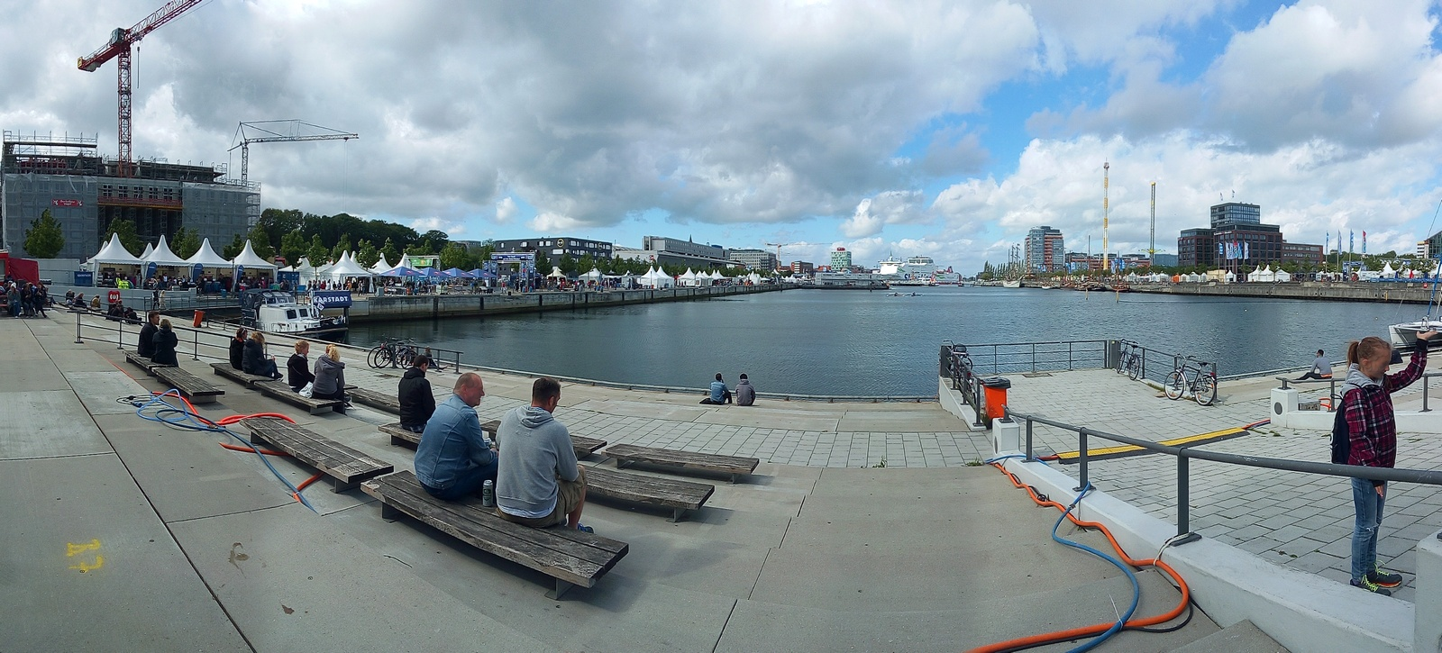 Kiel / Hörn / Blick in die Kieler Förde